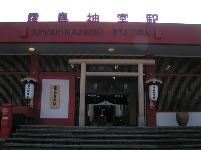 霧島神宮駅駅舎